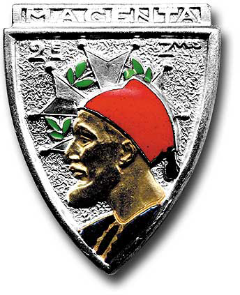 Blason du 2ème Régiment de Marche de Zouaves (a)